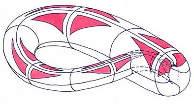 Klein-kancsó két fél Möbius-szalagból illesztve, a Möbius-szalagokon kettős fríz mintával